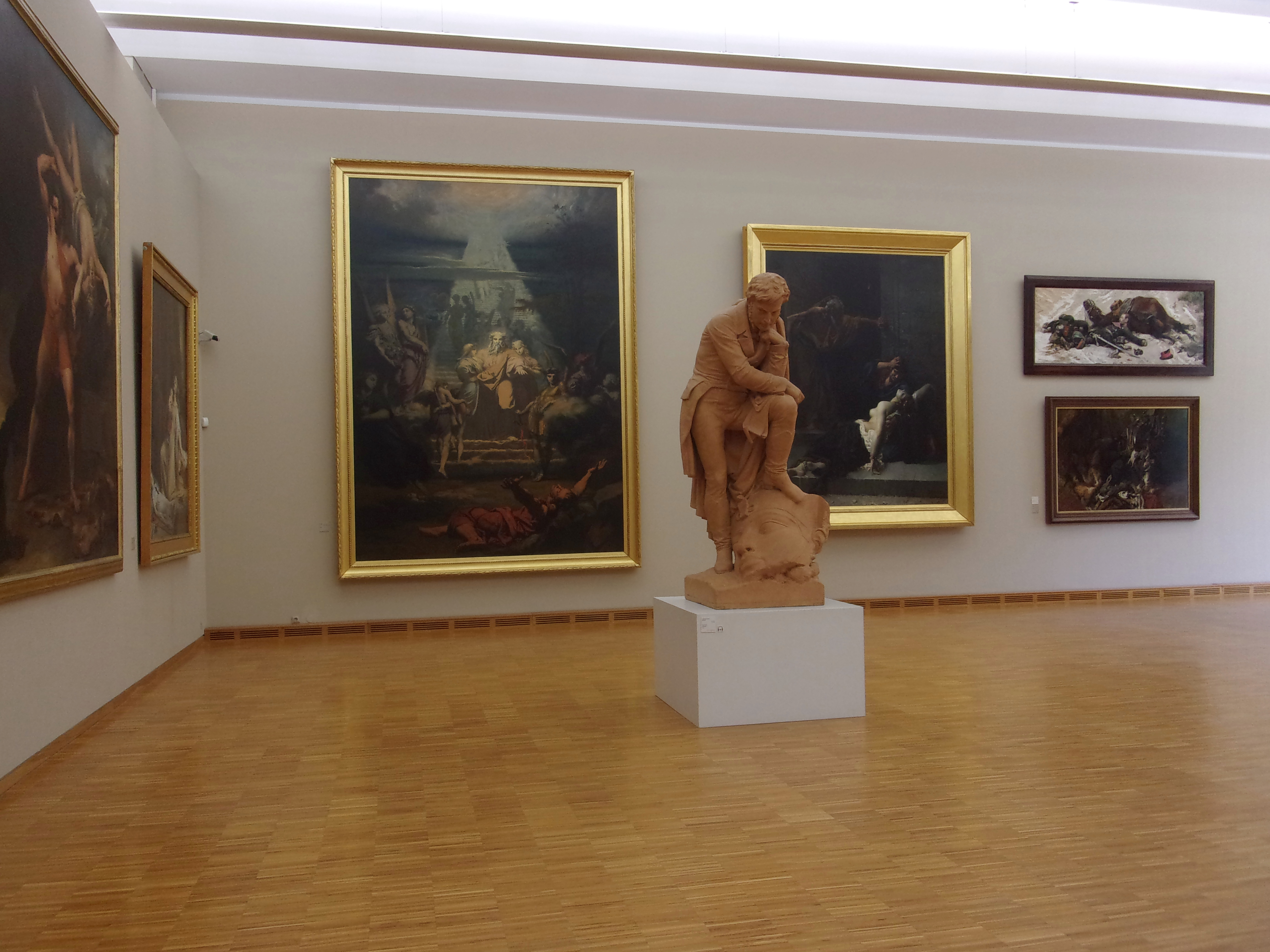 Salle N°17 XIXe siècle, Musée de Grenoble